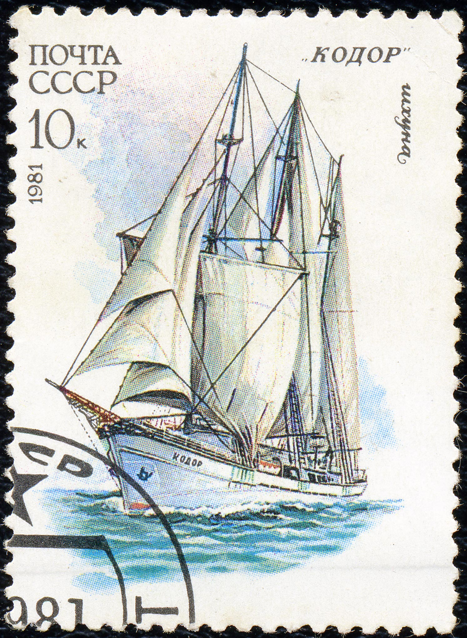 Почтовая марка СССР. 1981. Шхуна Кодор